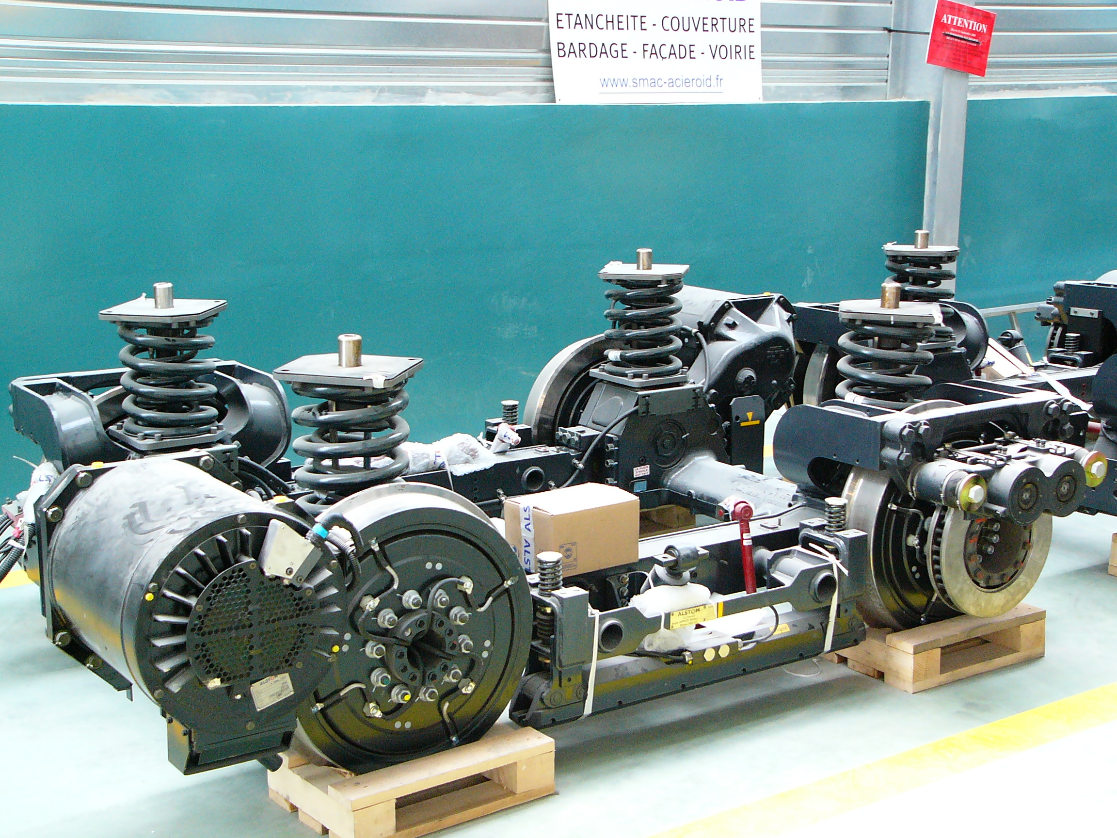 Bogie moteur de Citadis 302, à l'atelier de Lucotte du Tramway Parisien.